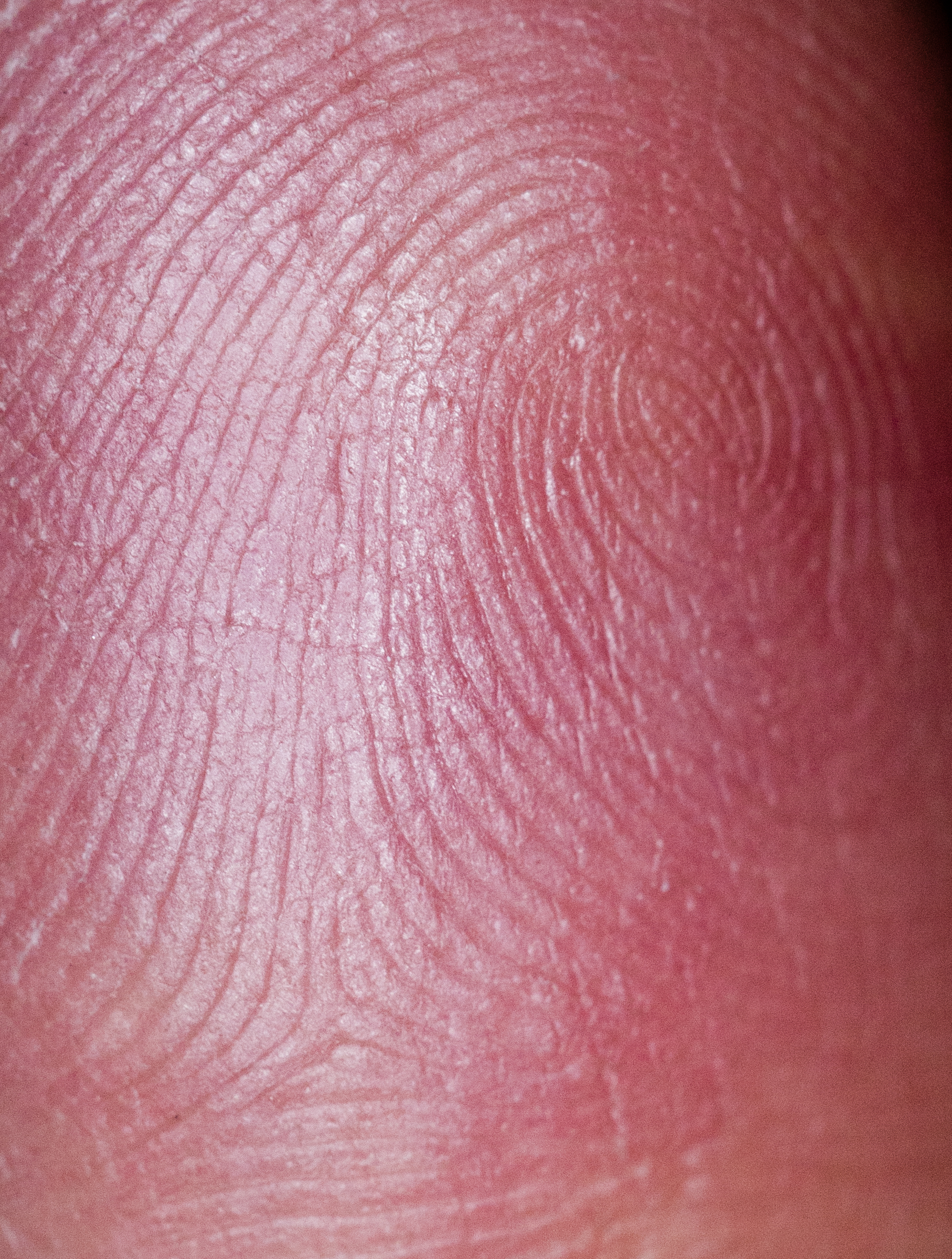 Finger mit gut sichtbaren Papillarleisten, deren Schweißdrüsen den Fingerabdruck hinterlassen